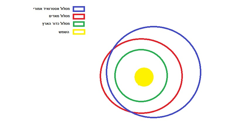 מסלול של האסטרואיד האמורי